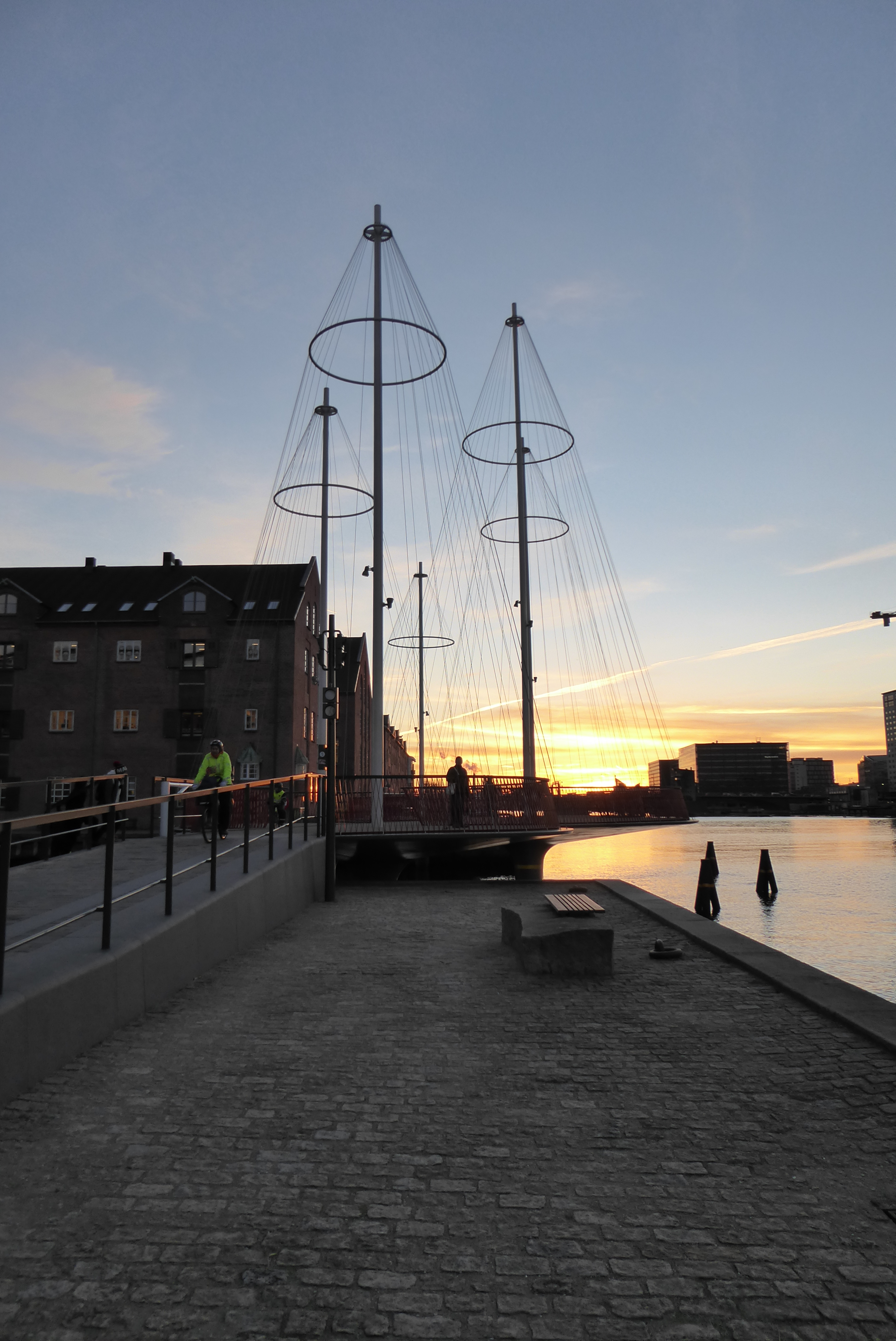 Cirkelbroen in Copenhagen, Denmark